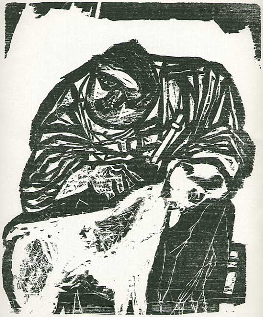 Grabado realizado por el artista plástico uruguayo, Carlos Fossatti.